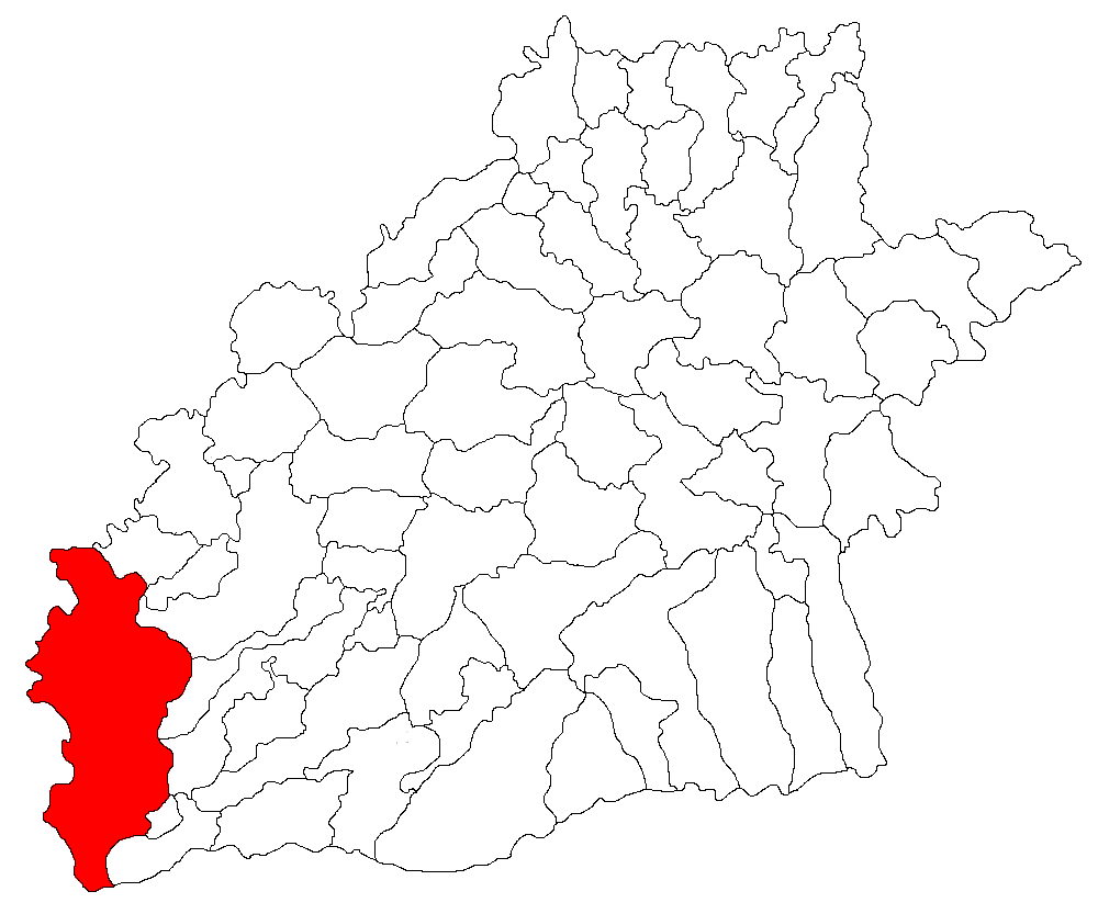 Categorie:Hărţi ale judeţului Sibiu